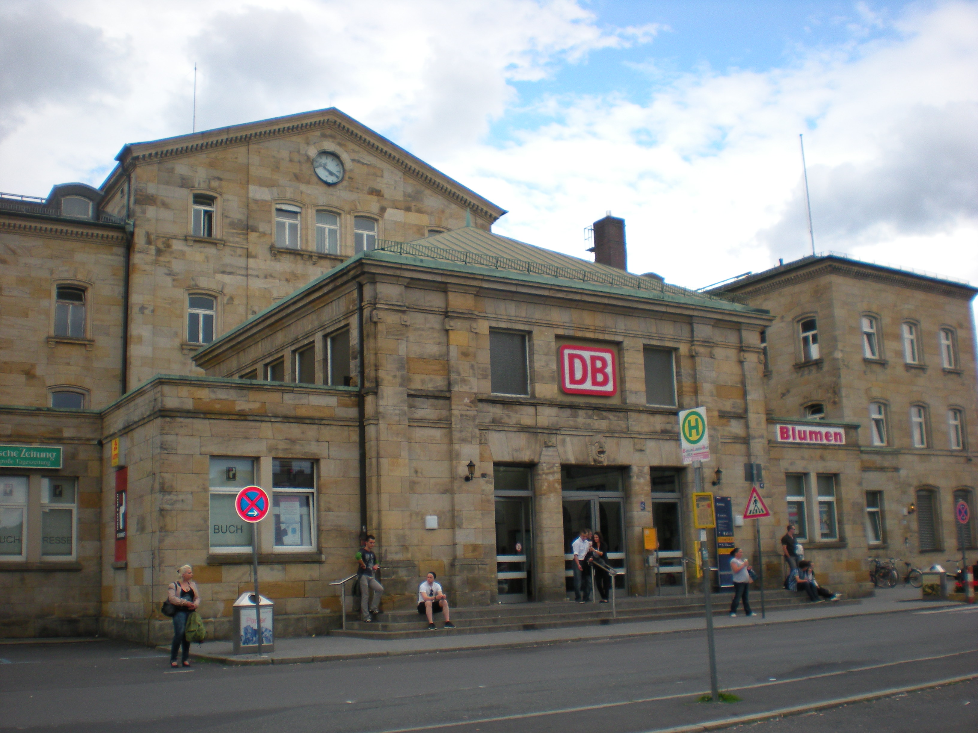 Bahnhofsgebäude Bamberg